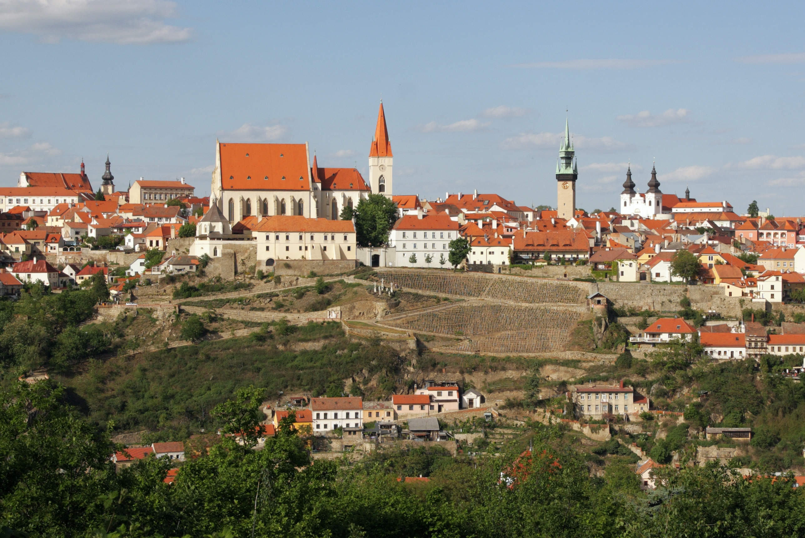 Panorama Znojma od Kraví hory.